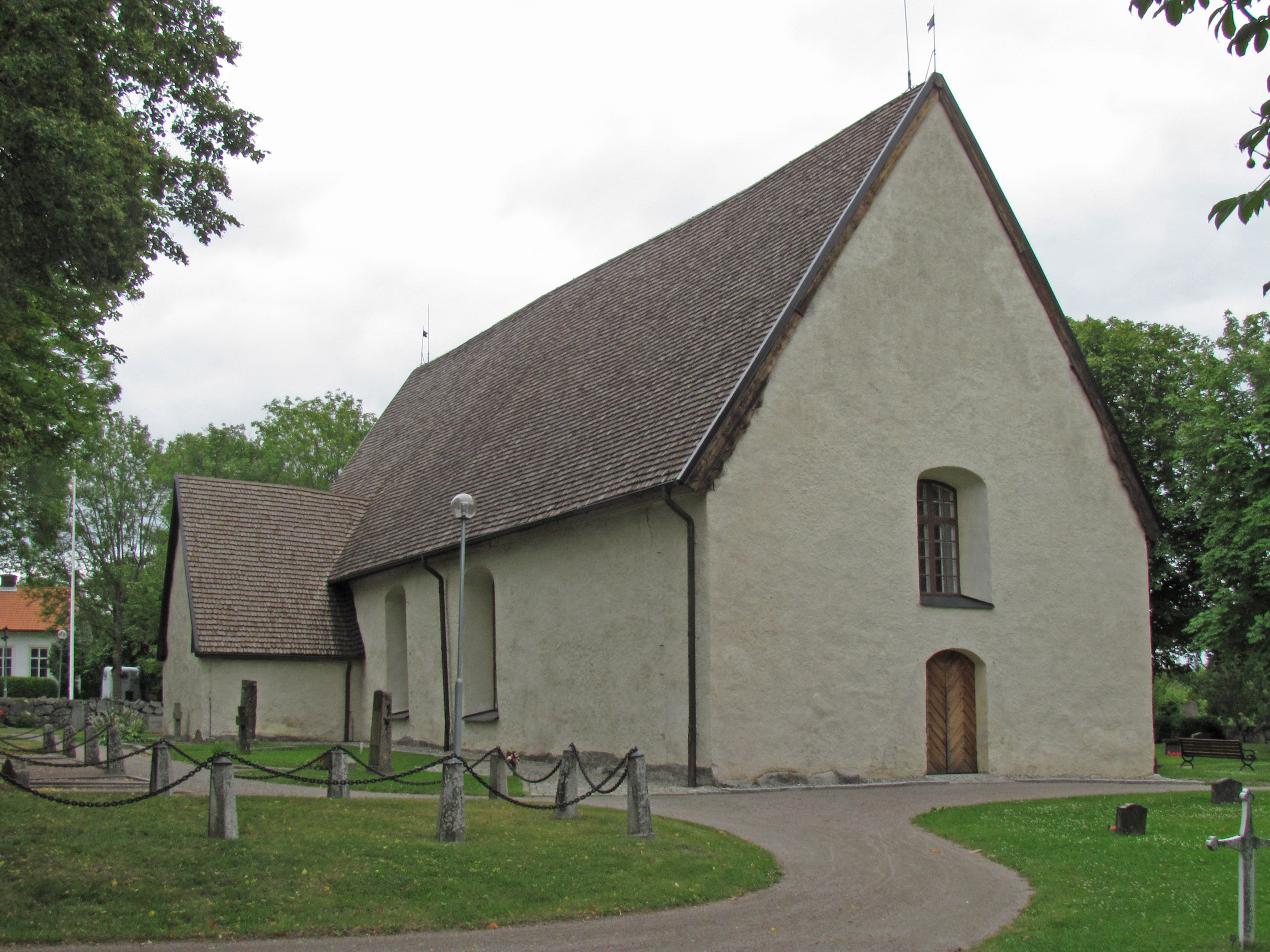 Kärrbo kyrka